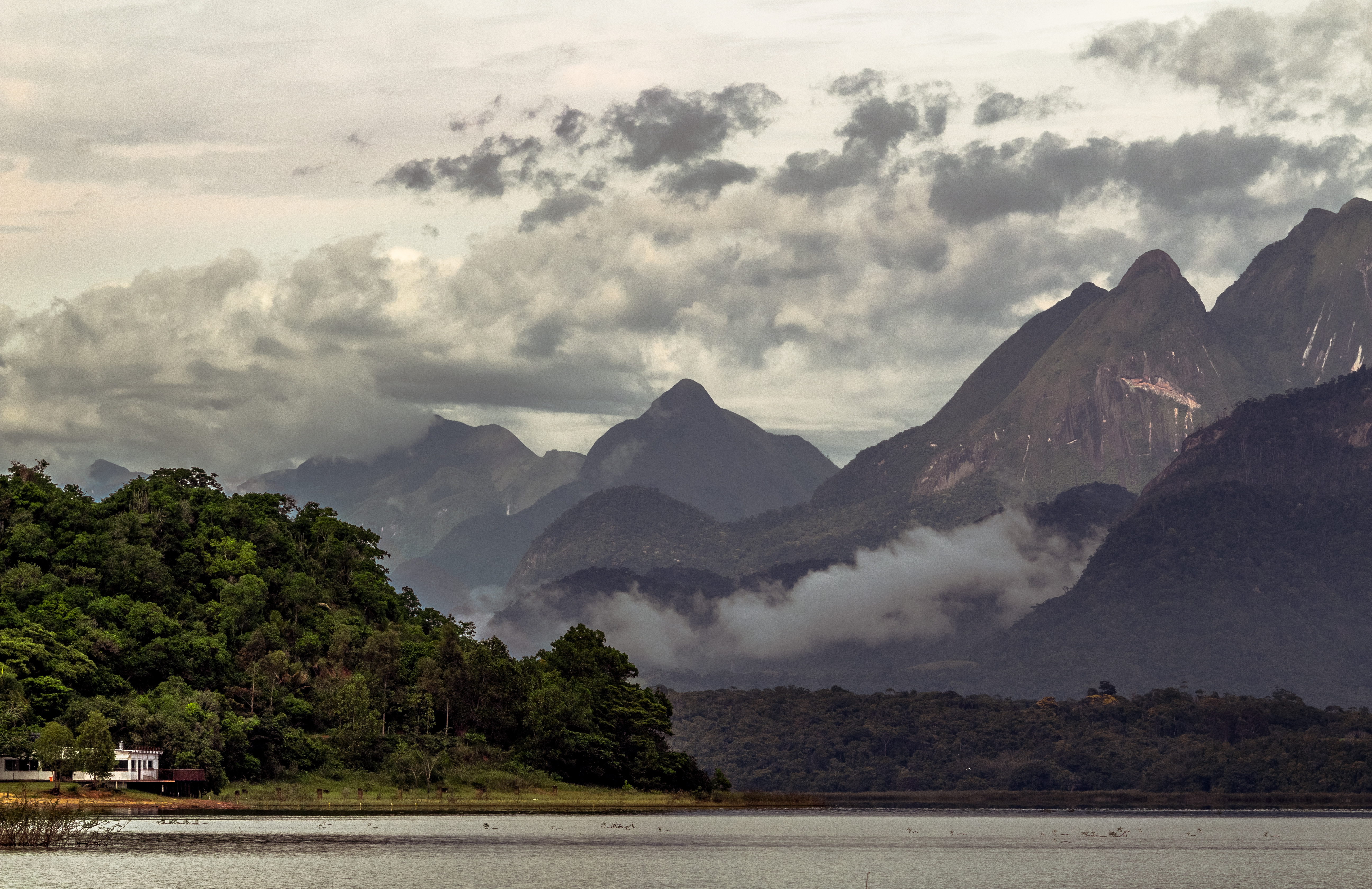 Destaque para o Pico da Redonda, o Pico com o rasgo. Um dos picos mais belos do Desengano. E compondo a imagem a Lagoa de Cima que fica ao entorno do Parque.